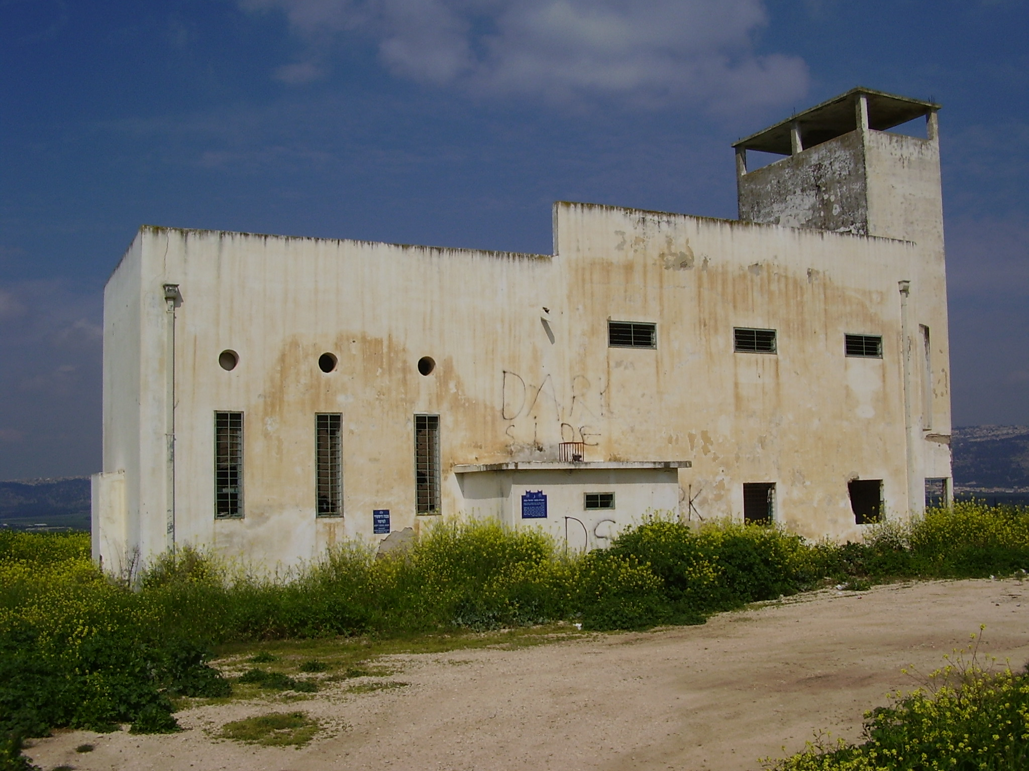 מחנה ישראל ליד דברת